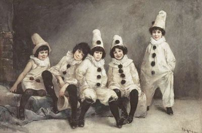 Групов портрет "Детски карнавал" (1888) от Фридрих Аугуст Каулбах, изобразяващ децата на семейство Прингсхайм в Мюнхен